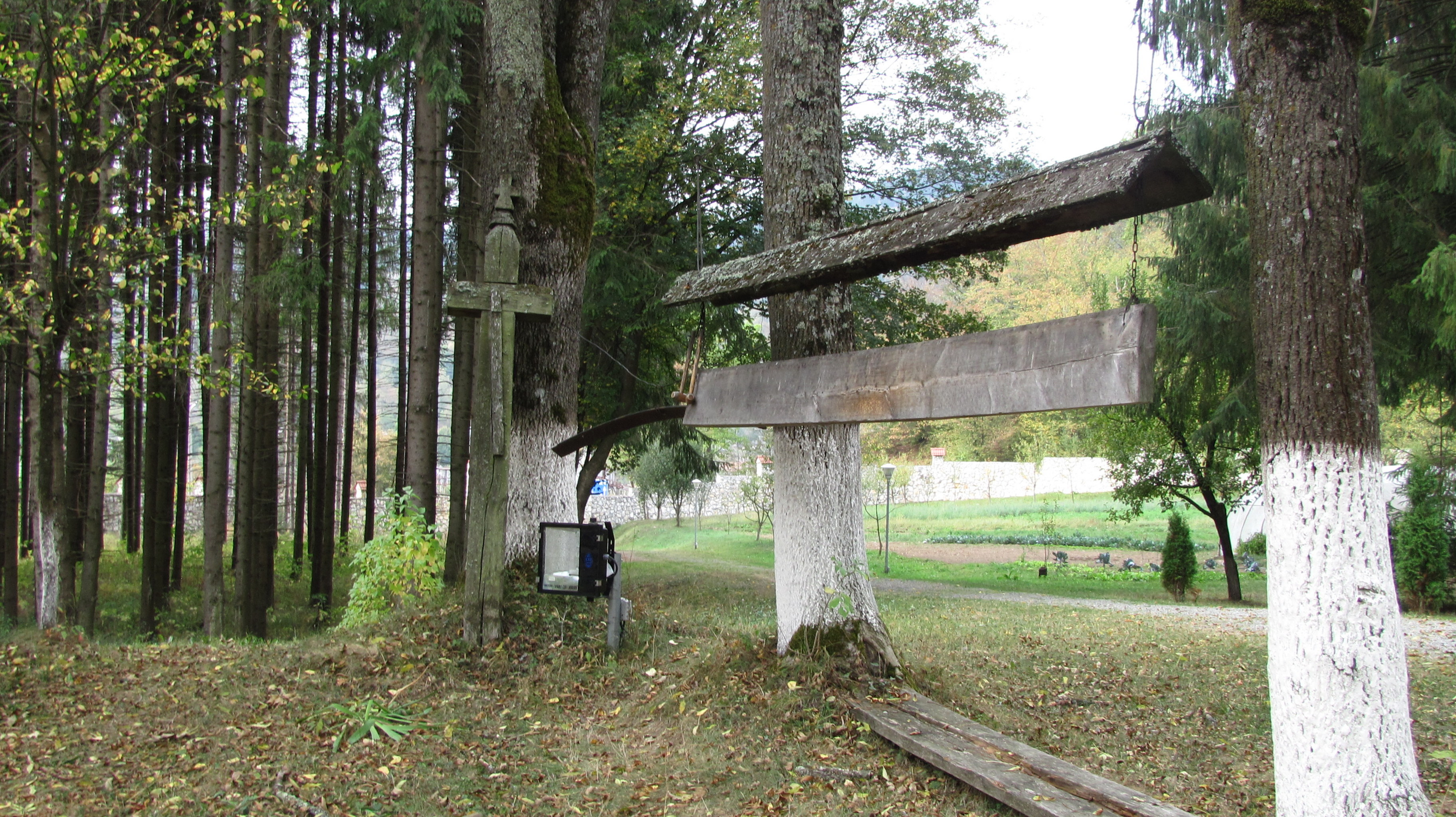 Mănăstirea Lupşa din satul Mănăstire, Alba - Cruce din lemn şi Toacă